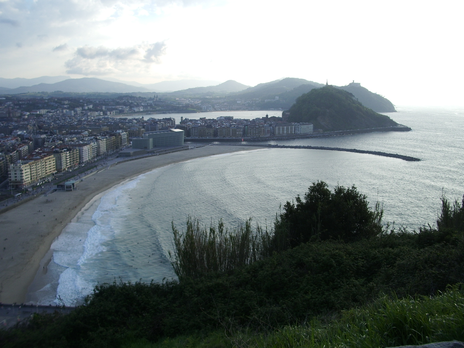 Donostiako Zurriola hondartza Ulis menditik ilunabarrean ikusia Nik neuk egina es: Es la playa de Gros de San Sebastián, detrás está la playa de la concha, y al fondo está el monte Igueldo, donde hay un parque de atracciones. También se ve el Kursaal.